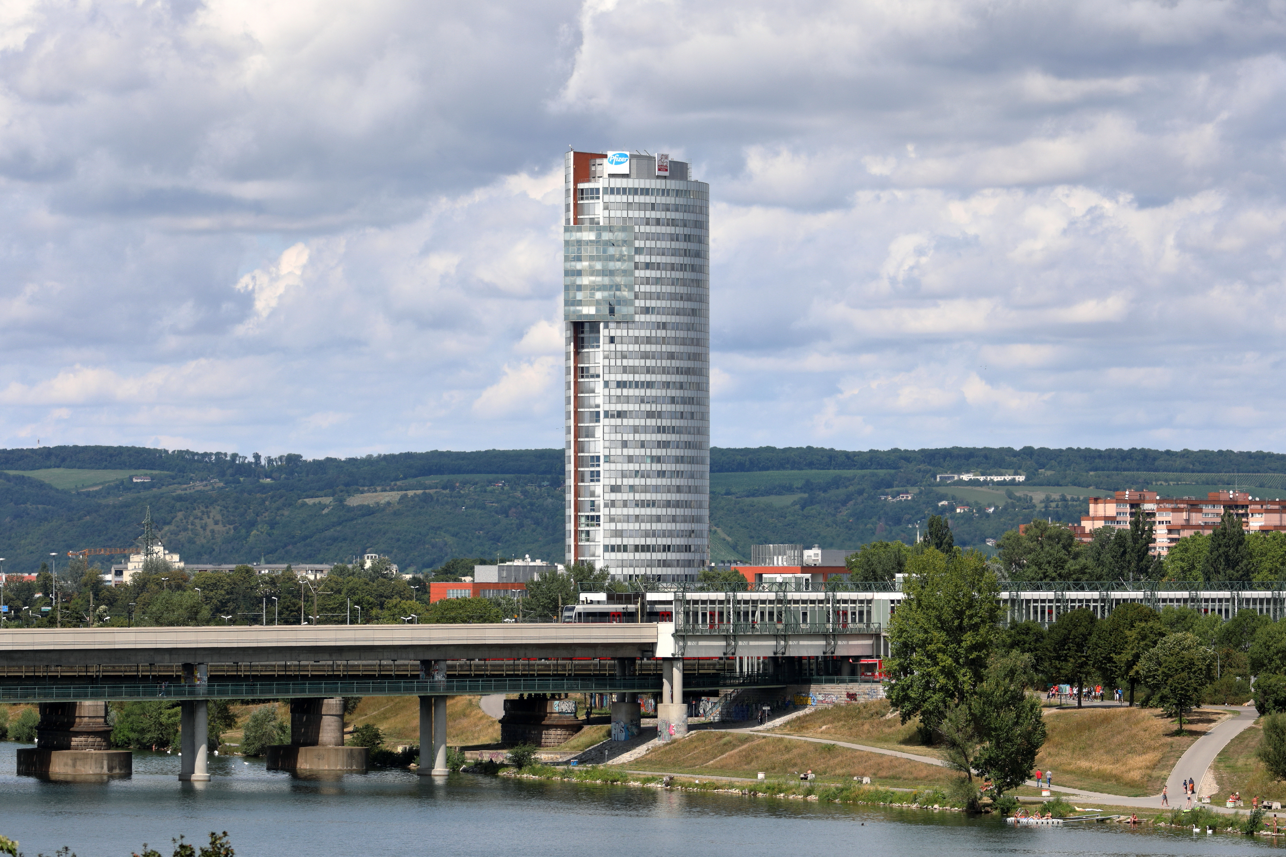 Blick von der Brigittenauer Brücke auf den Florido Tower im 21. Wiener Gemeindebezirk Floridsdorf.Das Bürohochhaus wurde von 1999 bis 2001 nach Entwürfen der Architekten Andreas und Herbert Müller-Hartburg errichtet. Das Gebäude zählt mit einer Höhe von 113 Metern zu den höchsten Bauwerken Wiens. Es verfügt über eine Nutzfläche von rund 36.000 m², die sich auf 31 Geschosse verteilen.